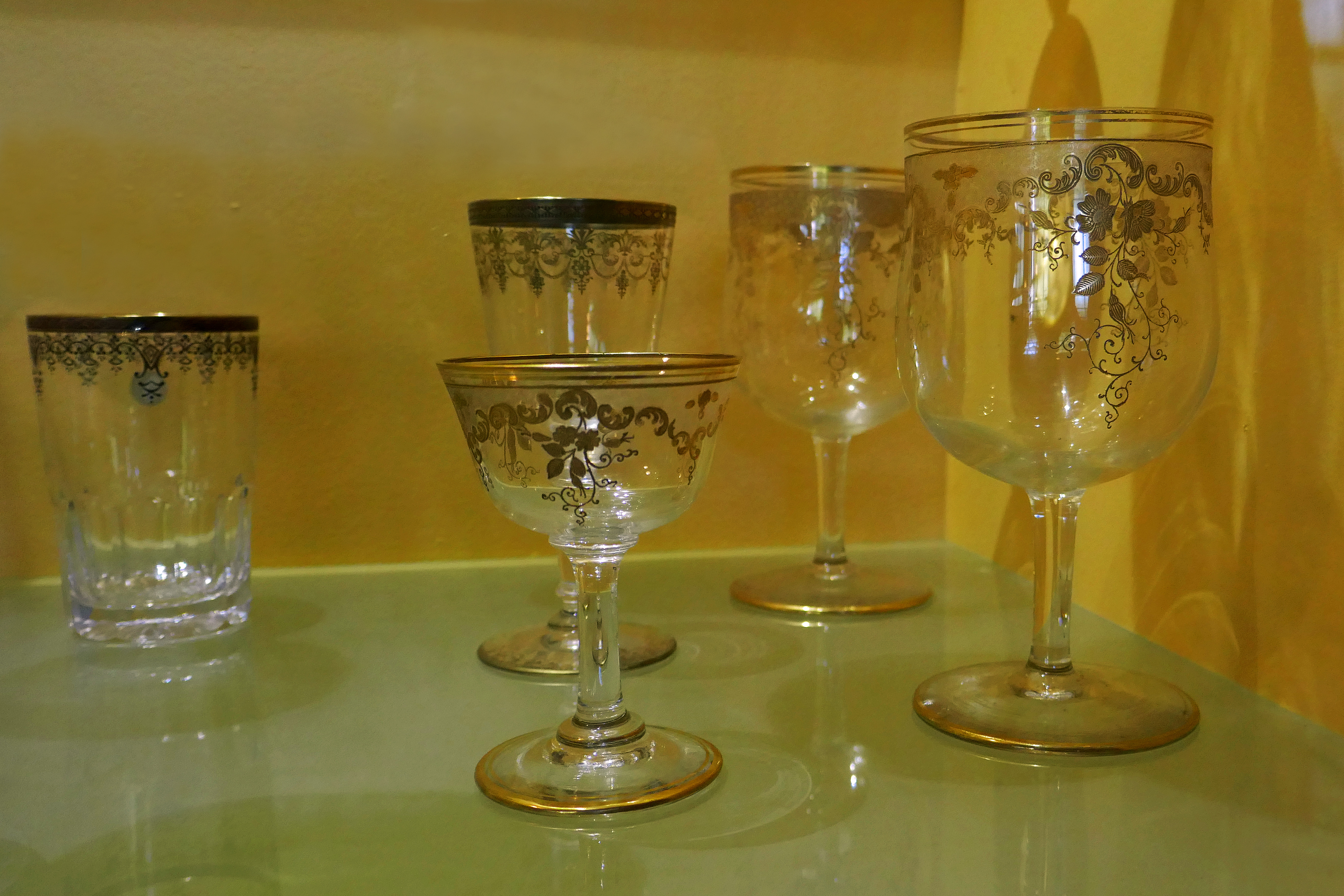 Verre à décor "guillochage" (décor à l'acide sur un pochoir en cuivre). Écomusée de la cristallerie de Portieux (Vosges), sur le site de l'ancienne usine fermée.